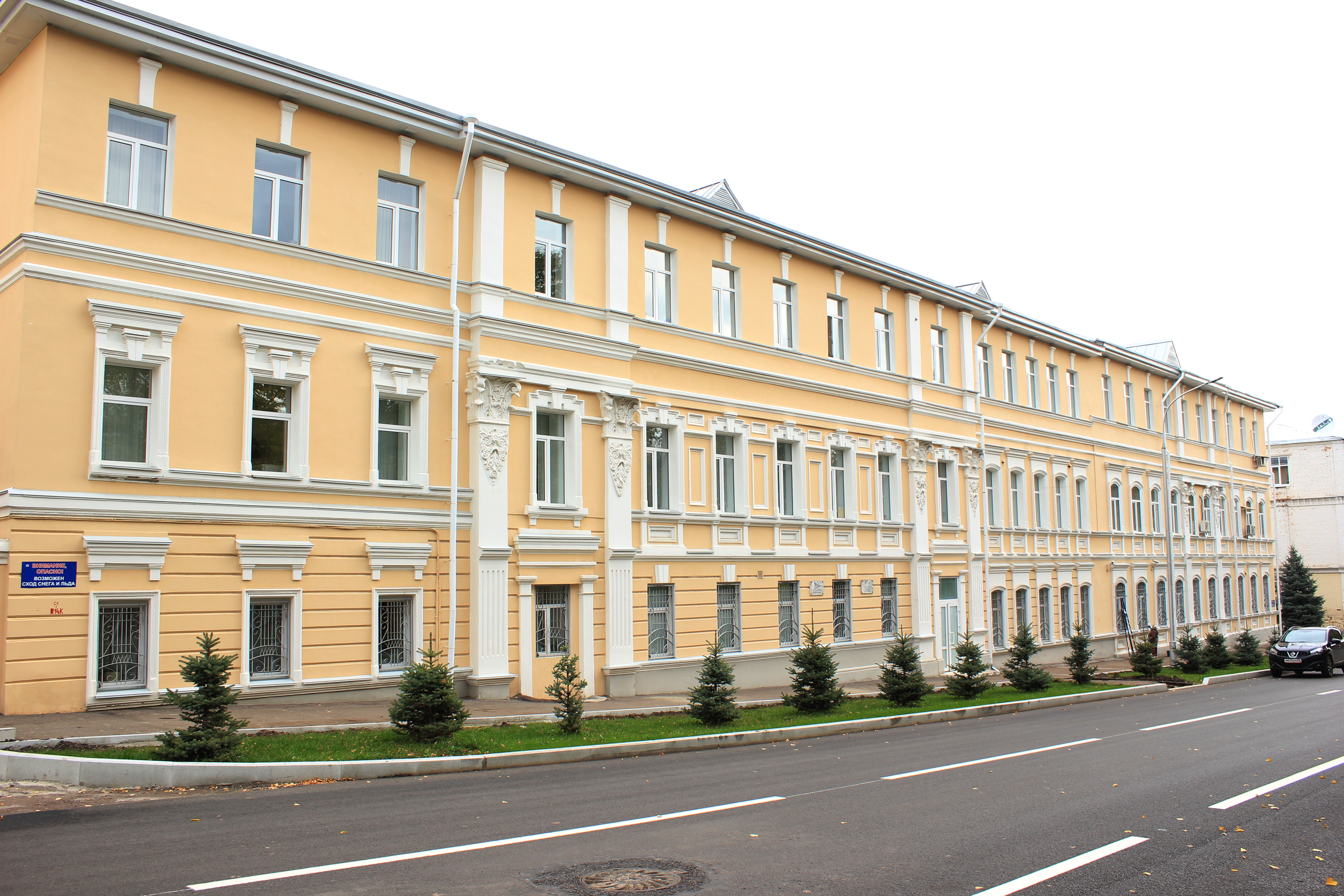 г. Уфа ул. Тукаева 25 В настоящее время "Верховный суд Республики Башкортостан"